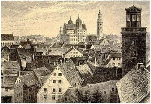 Augsburg, der Untere Brunnenturm am Mauerberg, im Hintergrund das Rathaus und der Perlachturm. Holzstich nach einer Fotografie, veröffentlicht 1886 in einem Augsburg-Führer des Verlags Orell Füssli & Co., Zürich.